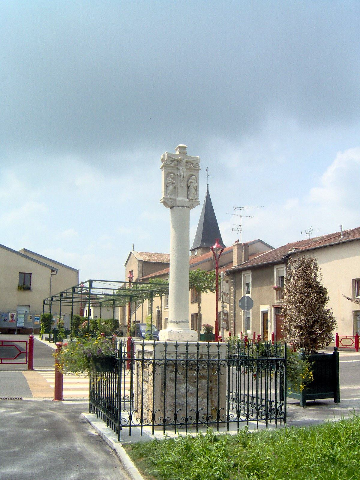 Vandières (Meurthe-et-Moselle)- calvaire croix 2007